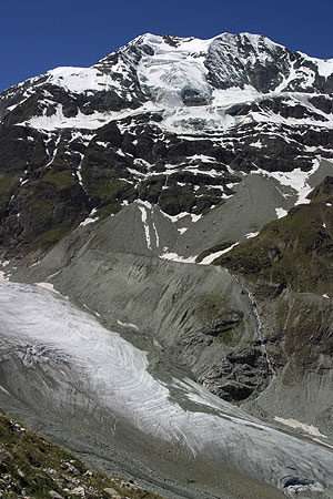 Gletscherzunge des Turtmanngletschers